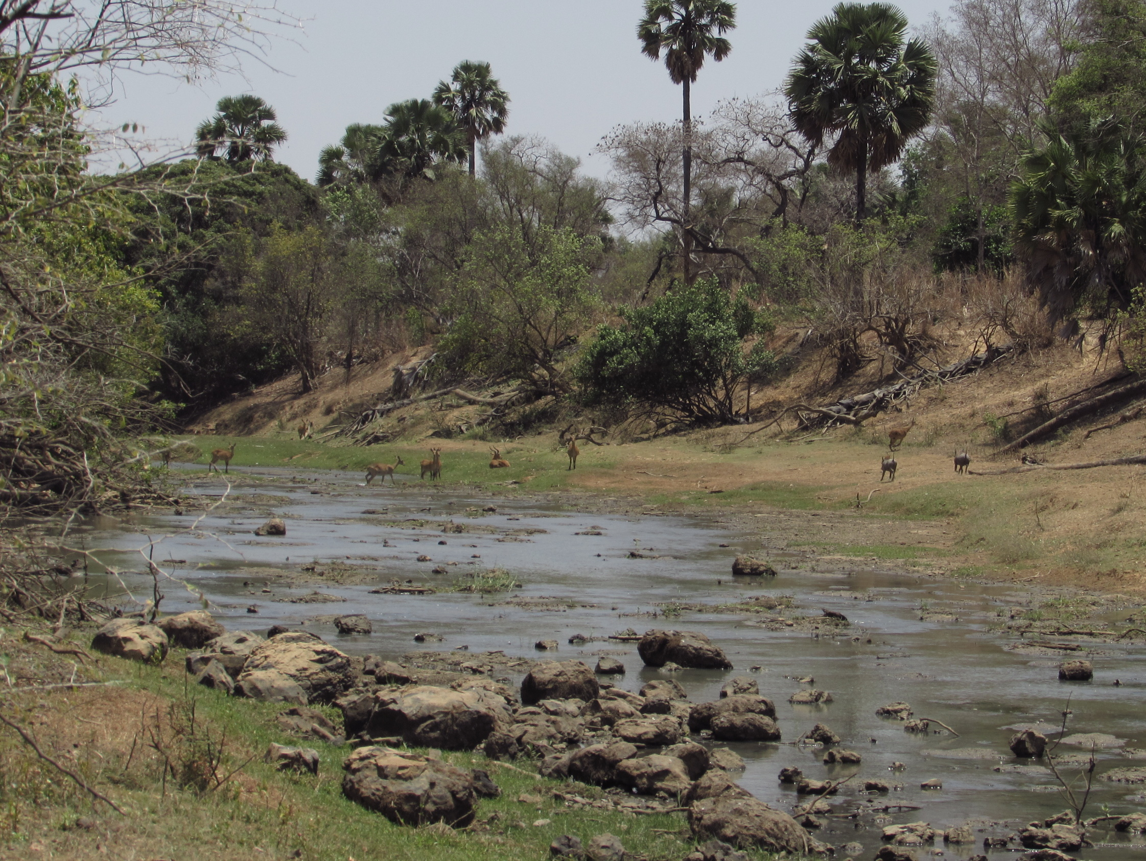 Die Pendjaririvier (ook Oti-) tydens die droëseisoen. Dit vorm die grens tussen Burkina Faso (Arly Nasionale Park op regteroewer) en Benin (Pendjari Nasionale Park op linkeroewer).